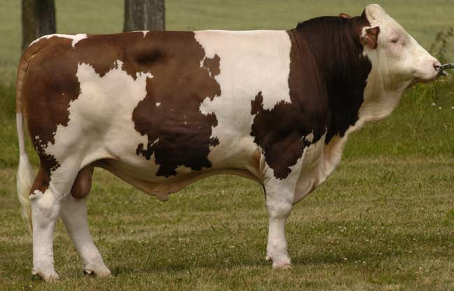 býk plemene český strakatý skot, majitel: CHD Impuls